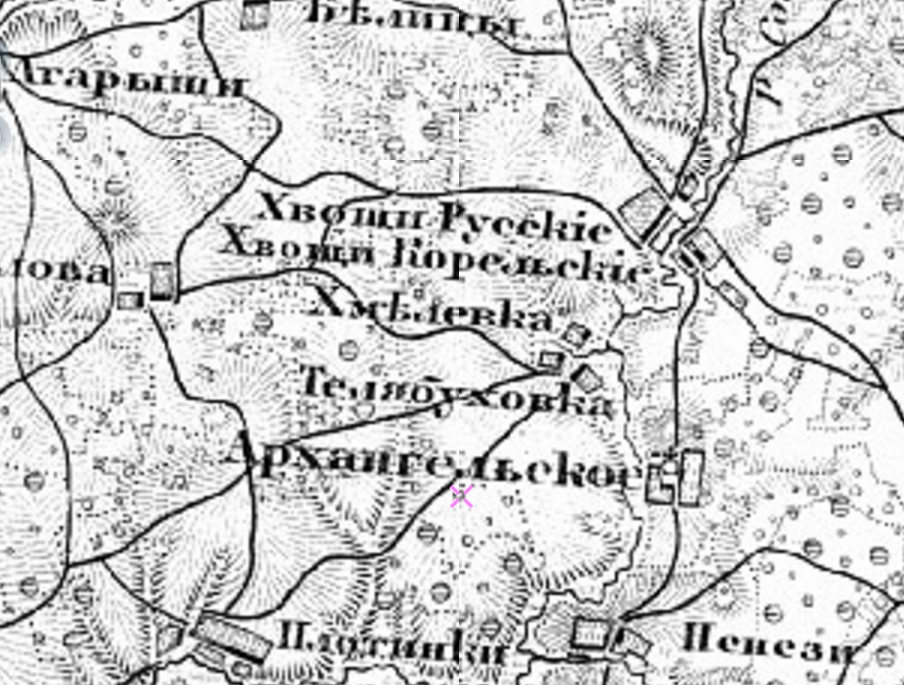 Морозовская дворцовая волость. На фрагменте карты отмечены Архангельское, Пенези